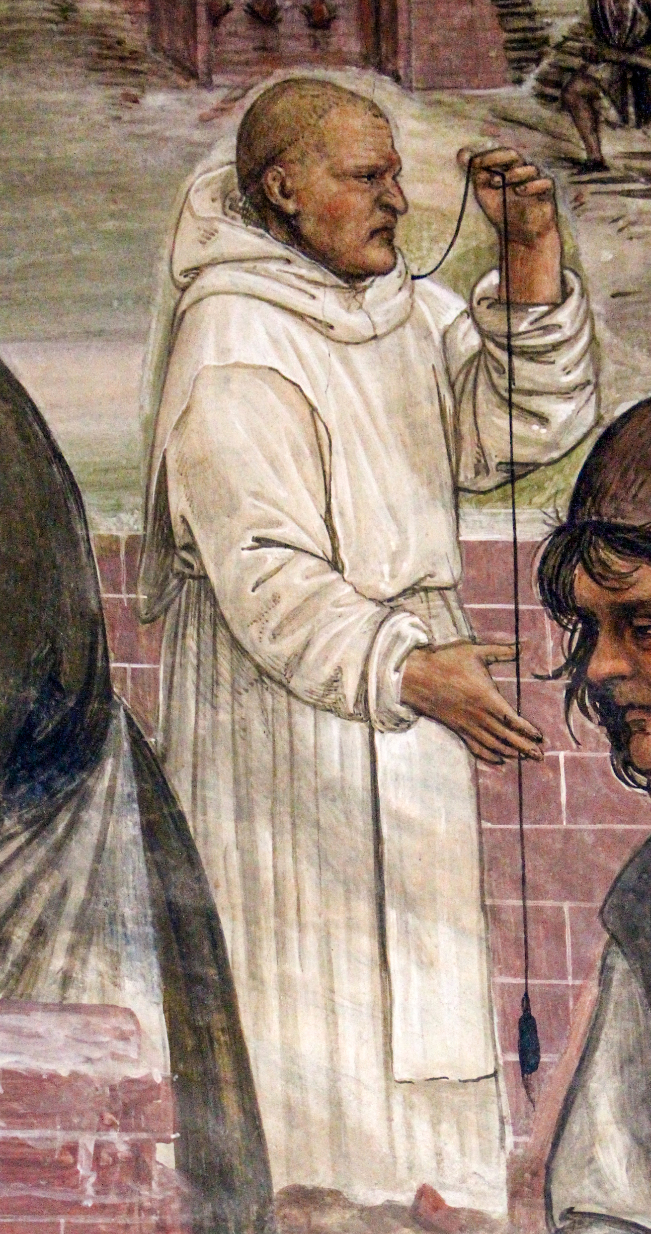 Uno sei due ritratti noti di Fra Giovanni da Verona dipinto dal Sodoma nel chiostro dell'Abbazia di Monte Oliveto Maggiore